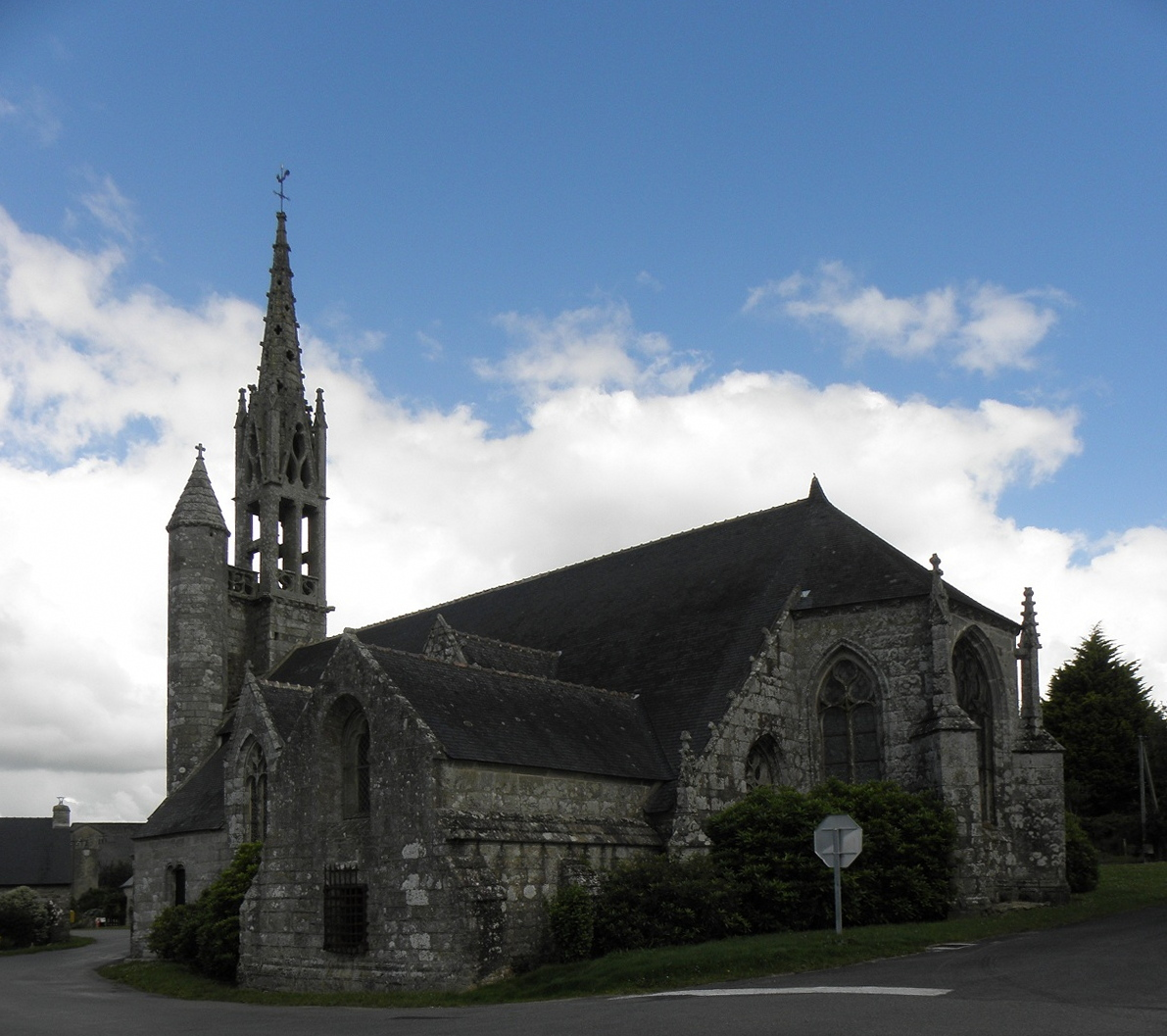 Clocher, flanc sud et chevet de la chapelle de la Trinité de Melgven (29).